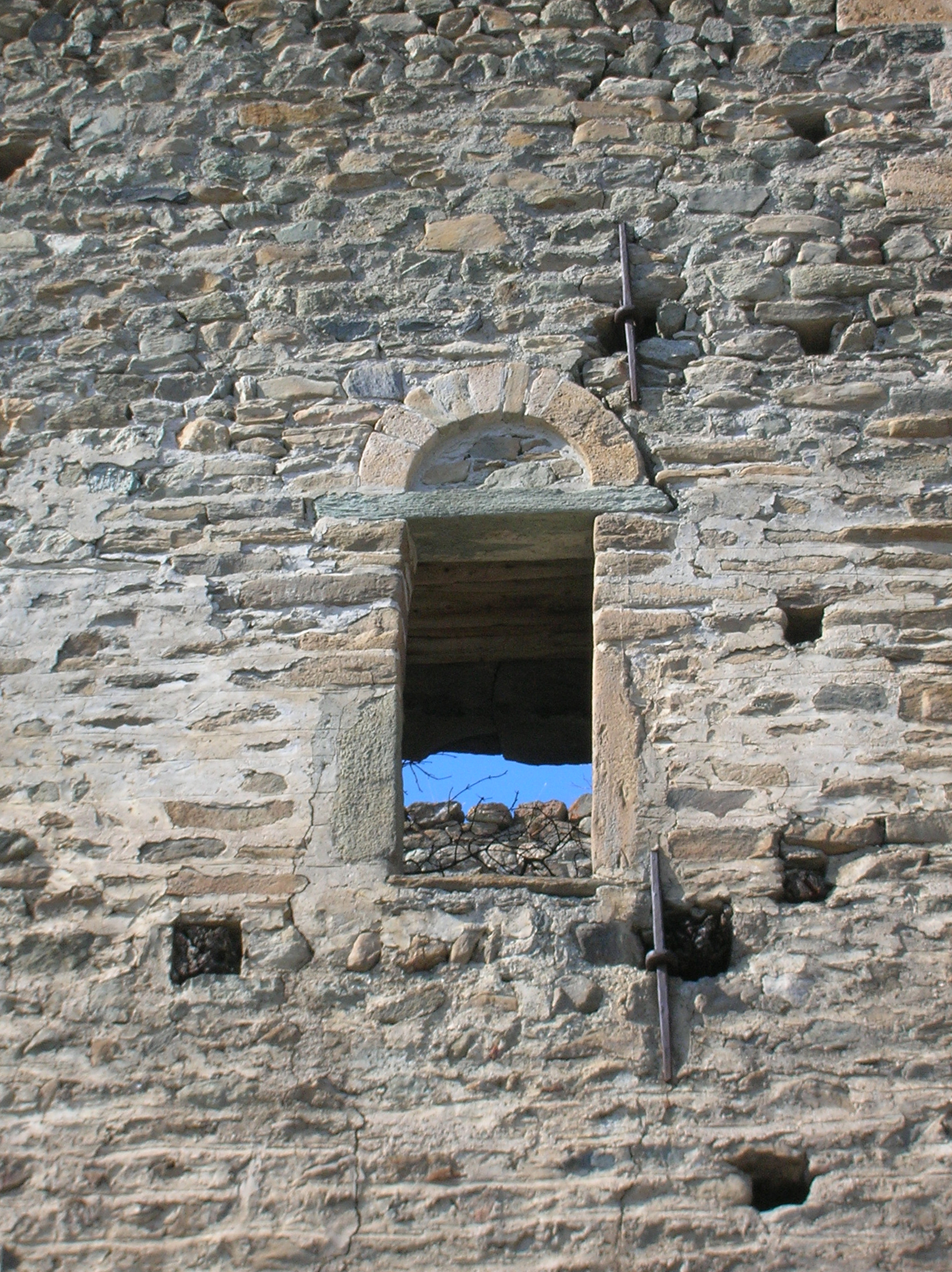 Dettaglio porta della Torre di Gignod a Gignod, Valle d'Aosta, Italia.